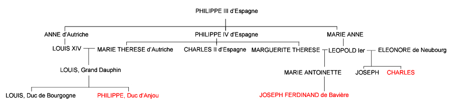 Arbres généalogiquess des prétendants au trône d'Espagne à la fin du XVII° siècle